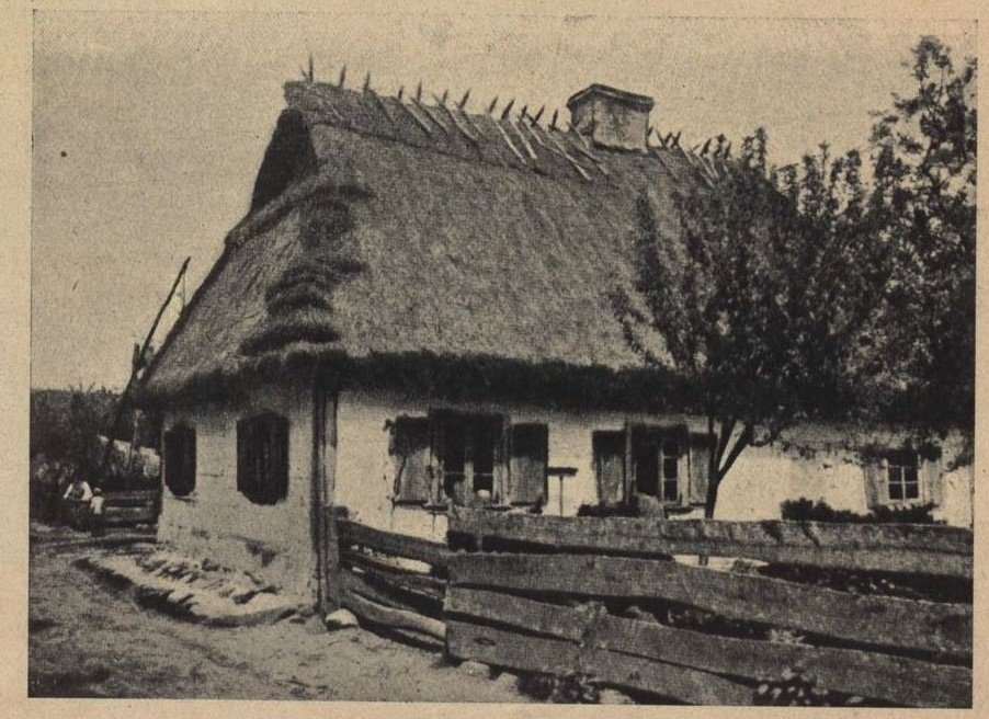 Materiały z wystawy Architektury Polskiej, urządzonej w 1915 r. staraniem Koła Architektów i Towarzystwa Opieki nad Zabytkami Przeszłości w Warszawie.